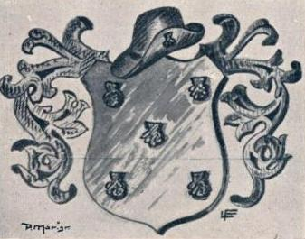 Brasão de Armas da família Velho, in Álbum Açoriano, fascículo 39, 1903. p. 312.